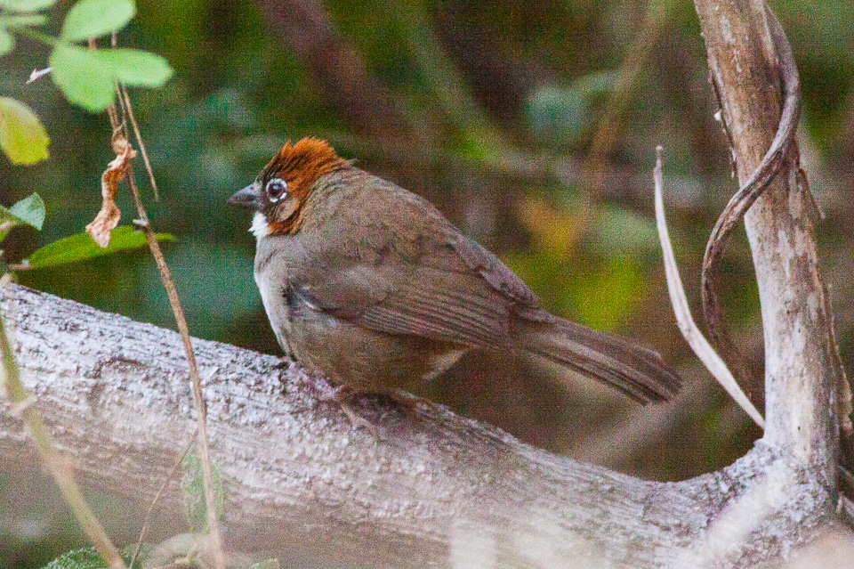 Durango Highway,Sinaloa